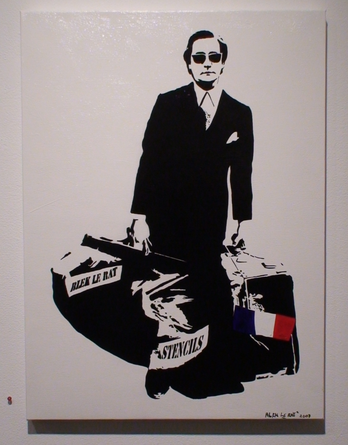 Blek Le Rat 2007